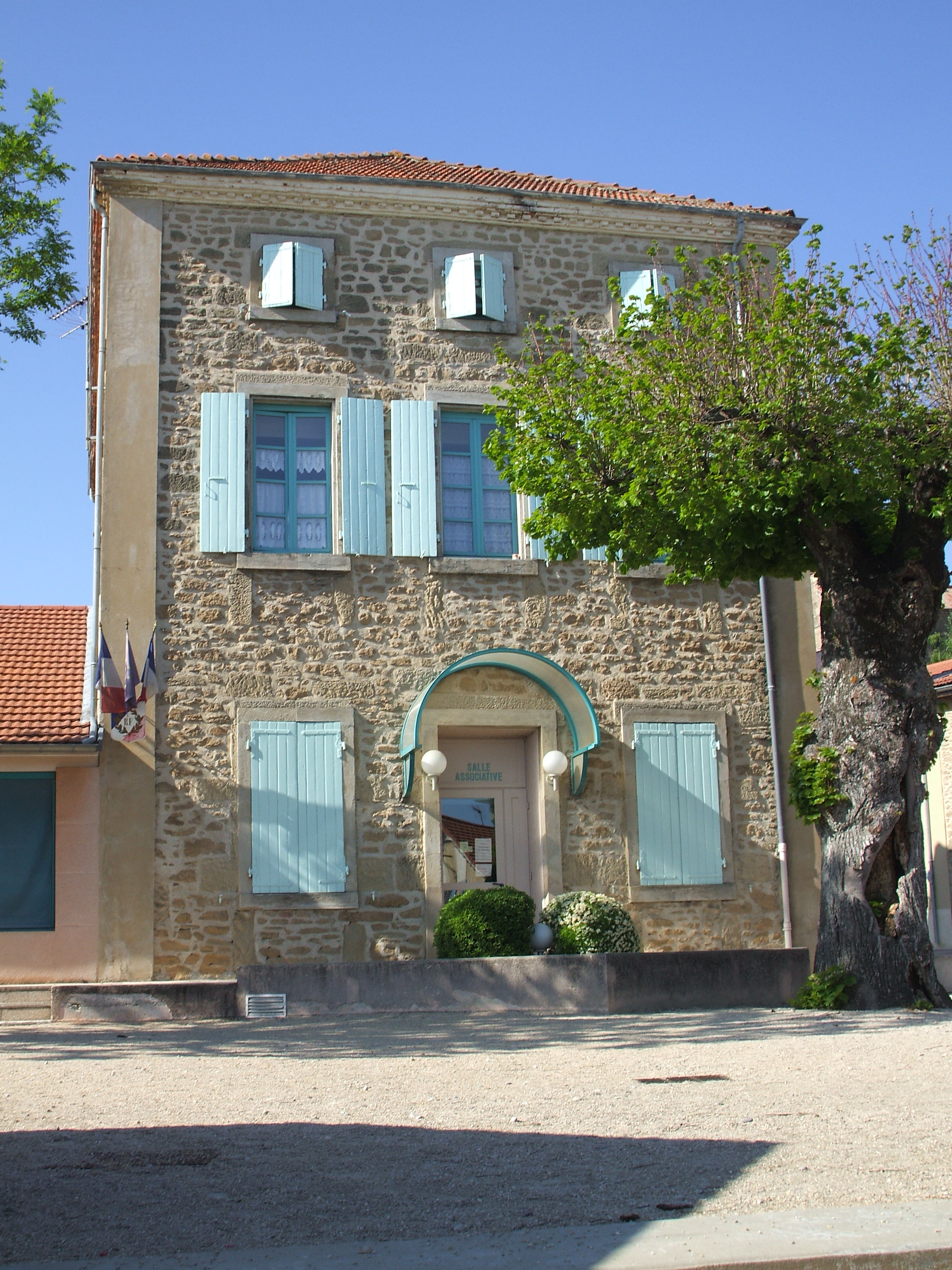 mairie